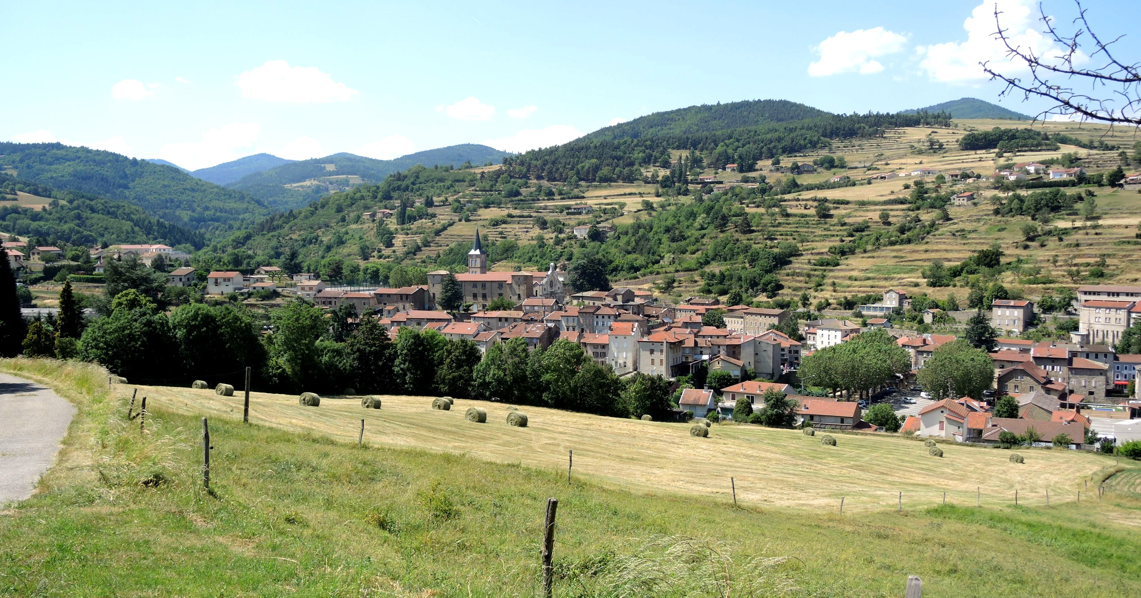 Satillieu vue générale